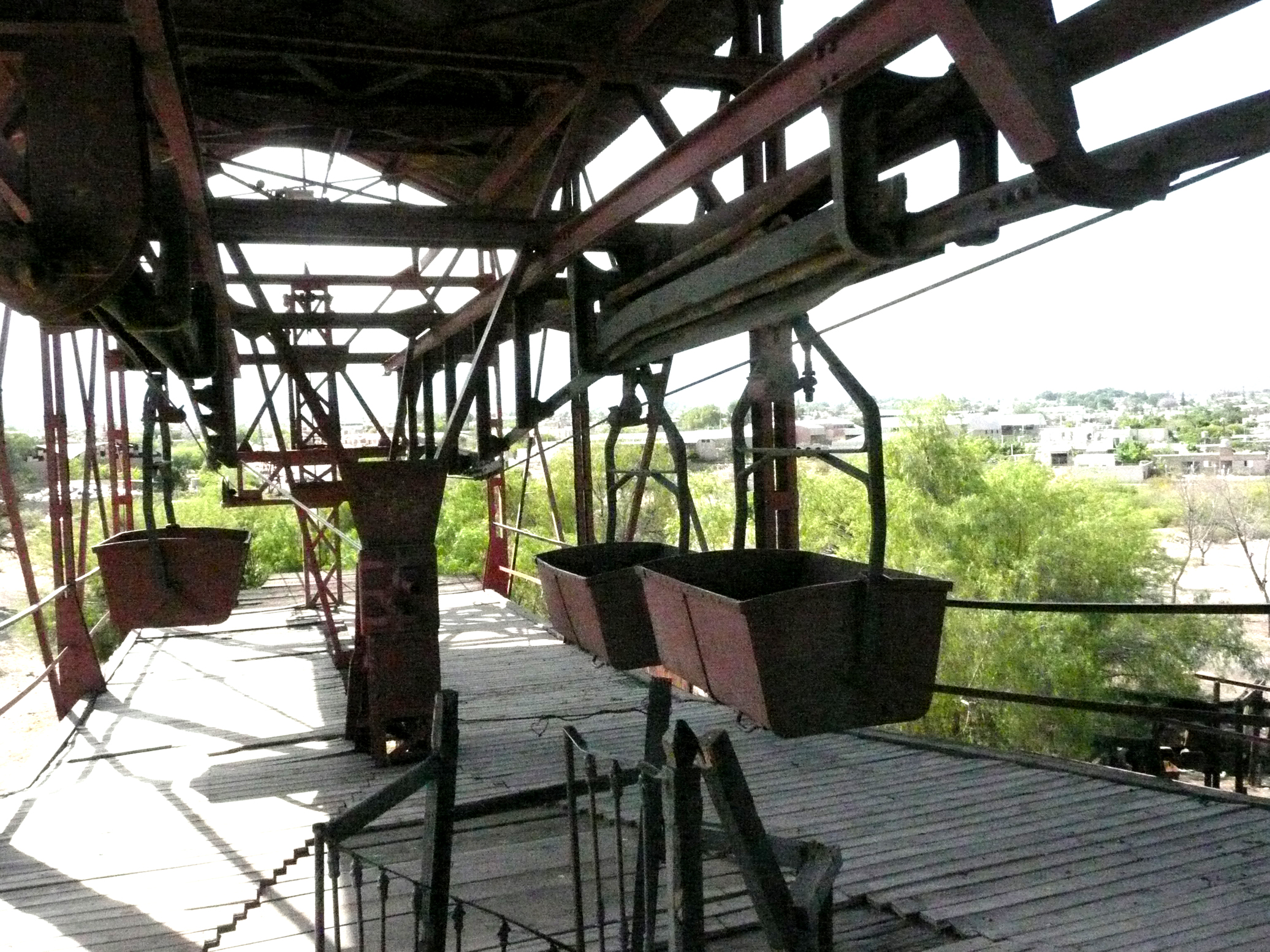 Cable carril de Chilecito La Mejicana